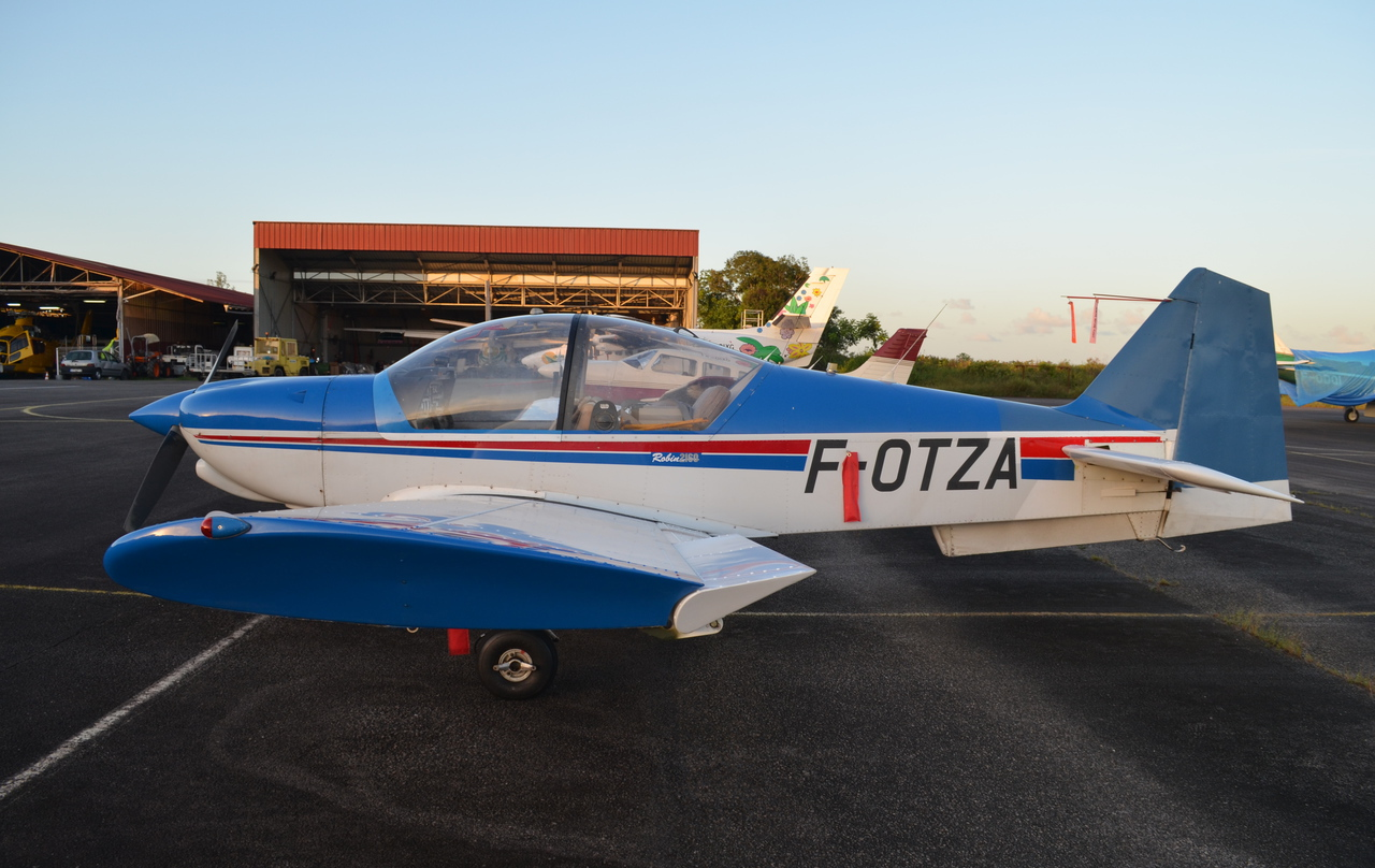 F-OTZA